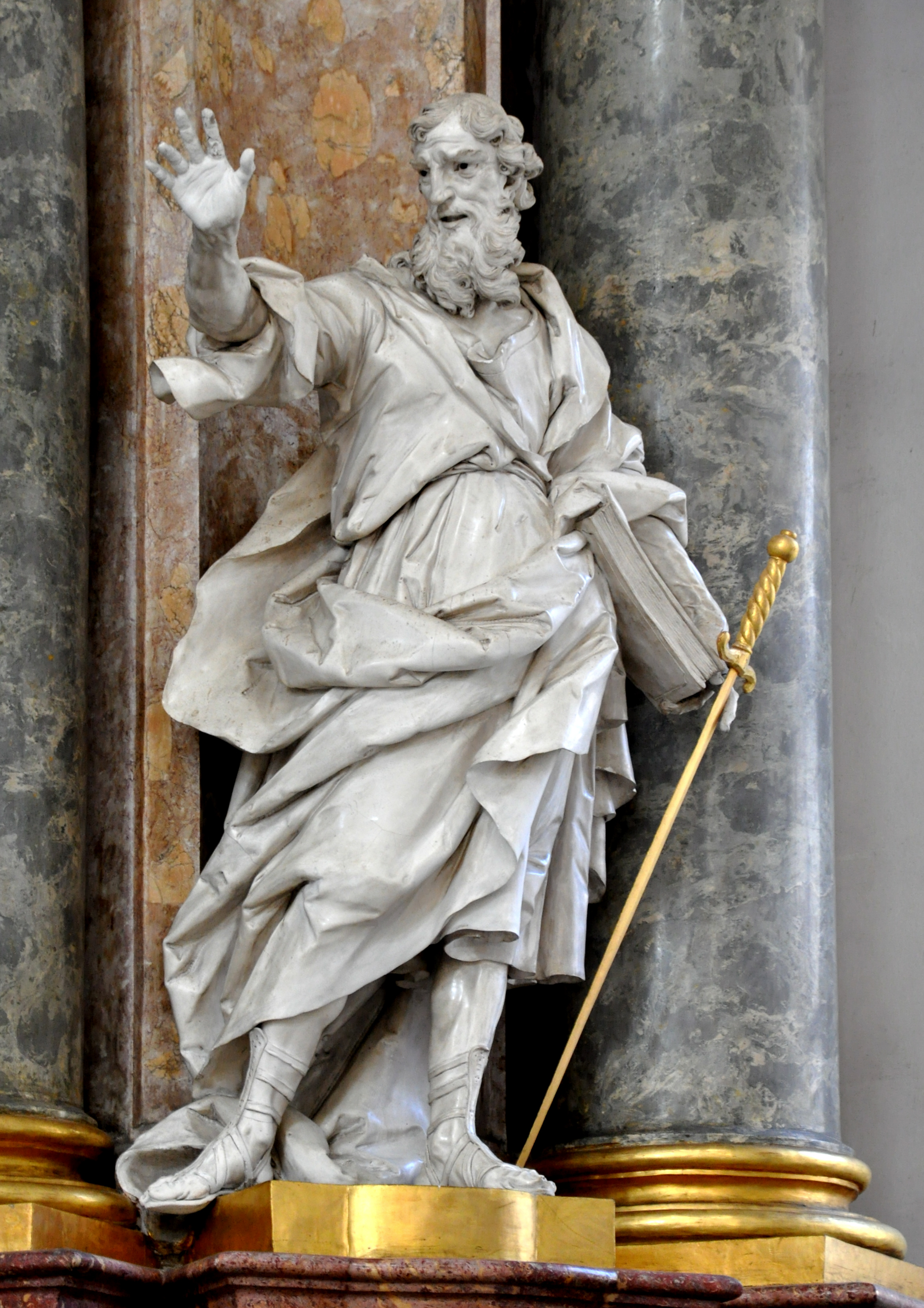 Kreuzigungsaltar im nördlichen (linken) Querschiff der Basilika St. Martin und Oswald, Weingarten (Württemberg). Altarbau und Stuckfiguren von Diego Francesco Carlone, 1724. Statue Hl. Paulus.